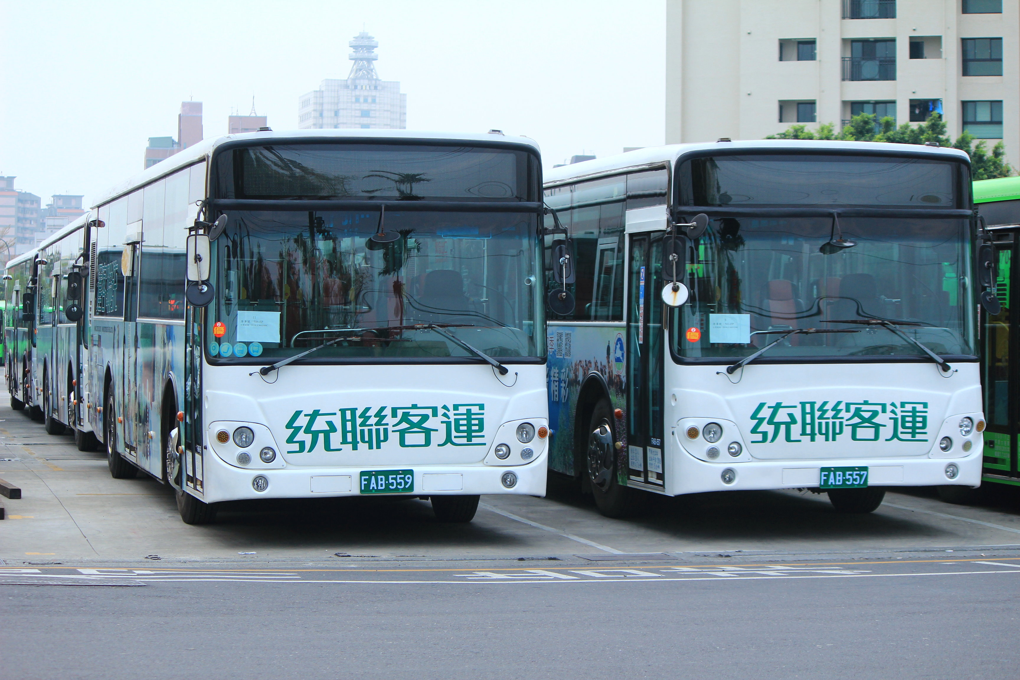 統聯客運大宇BC211M大客車FAB-559與FAB-557